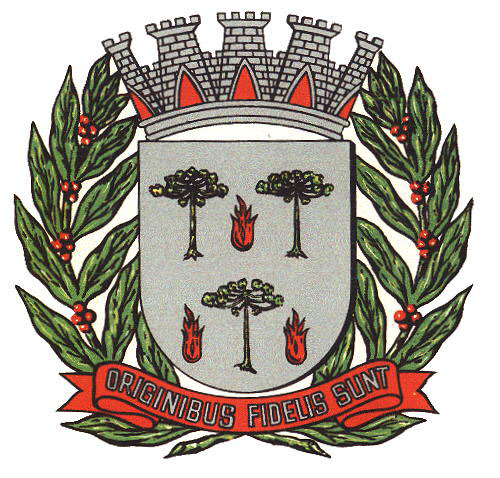 Brasão do Município de Espírito Santo do Pinhal